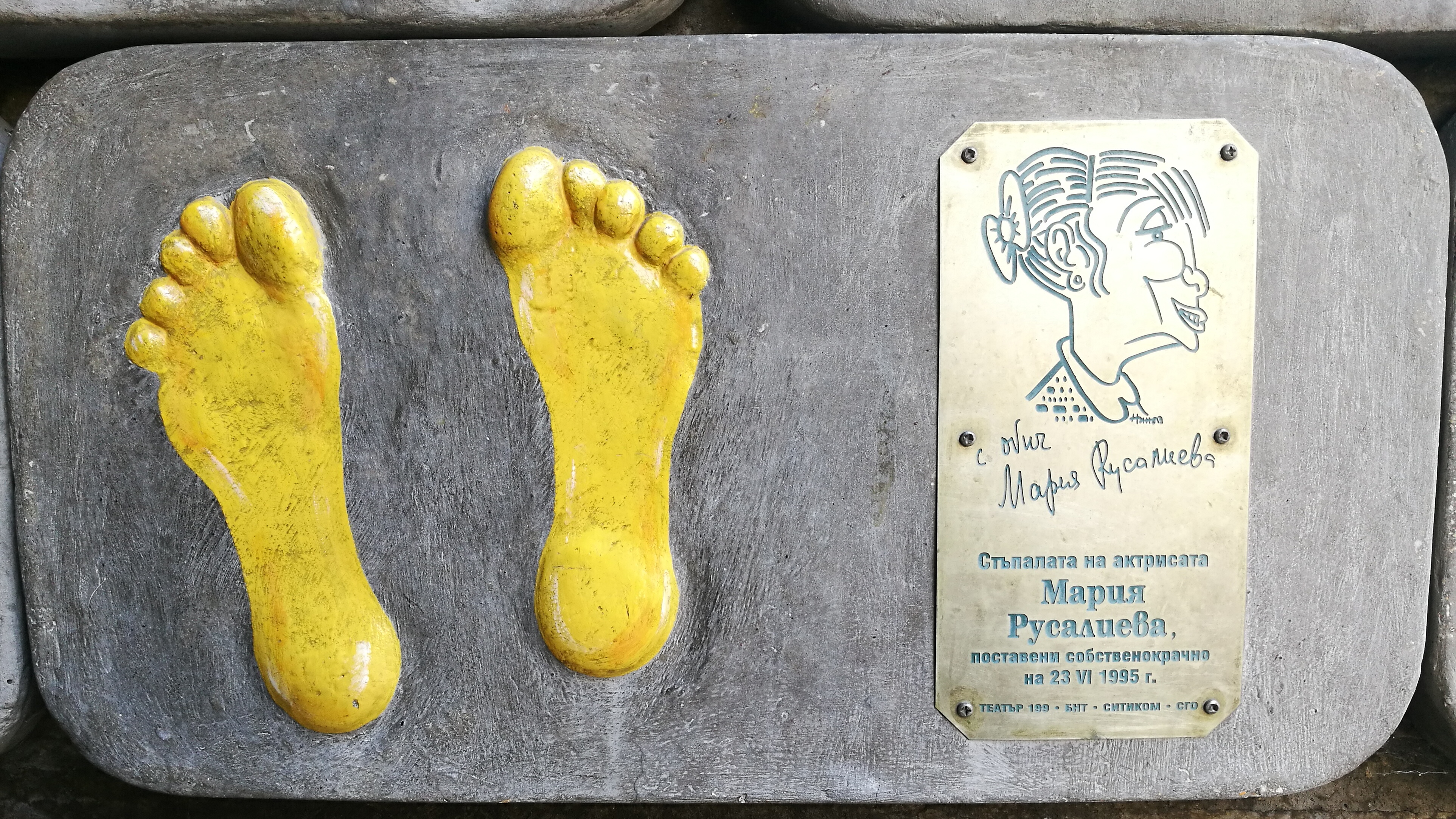 Стената на славата пред Театър 199 - пано с отпечатъци, послание и шарж на Мария Русалиева.